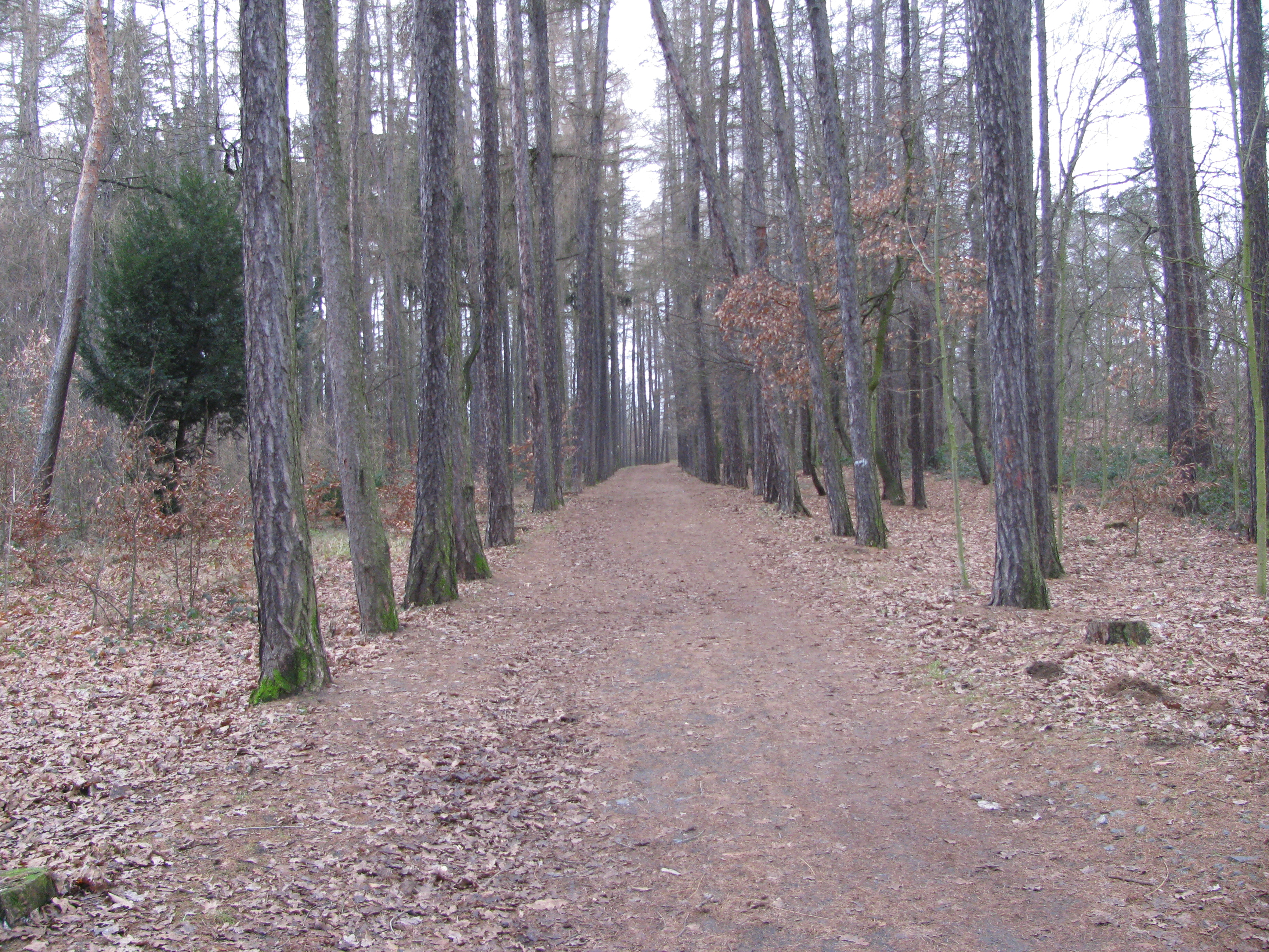 Lesopark slouží jako odpočinkové místo pro lidi z širokého okolí.